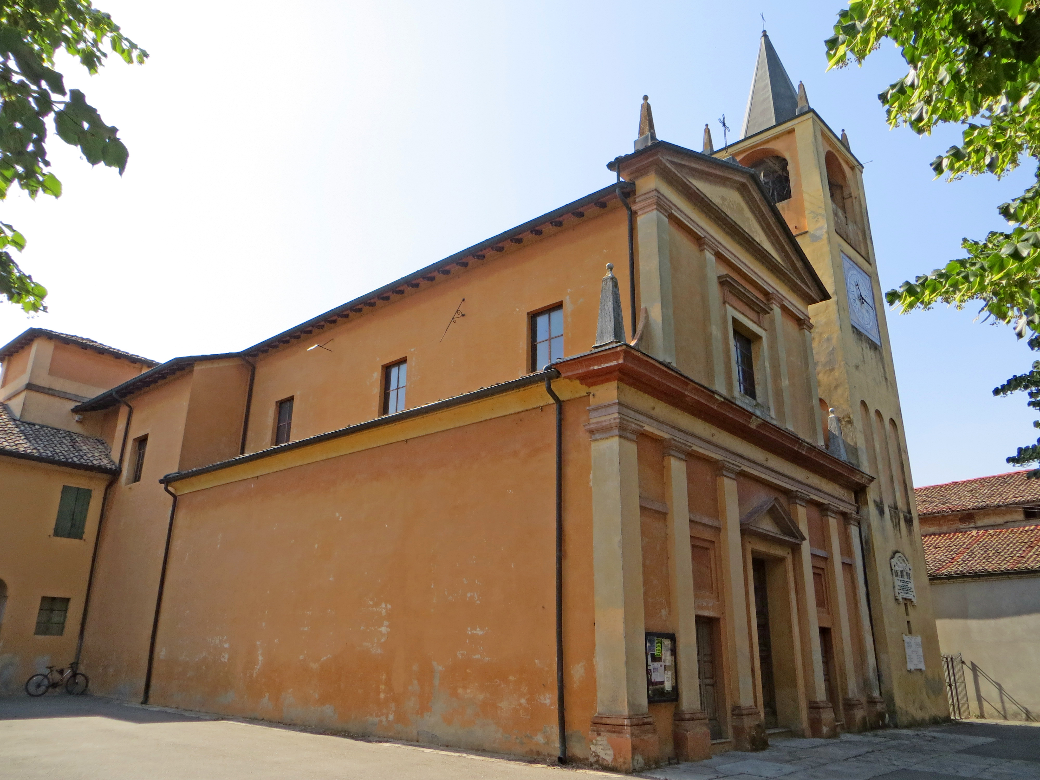 Chiesa di San Pietro (Vigatto, Parma) - facciata e lato sud